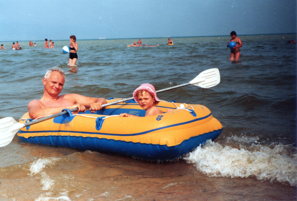 Der zweite Verschlussvorhang holt den ersten ein. Eine Unterbelichtung des rechten Bildrandes ist die Folge.